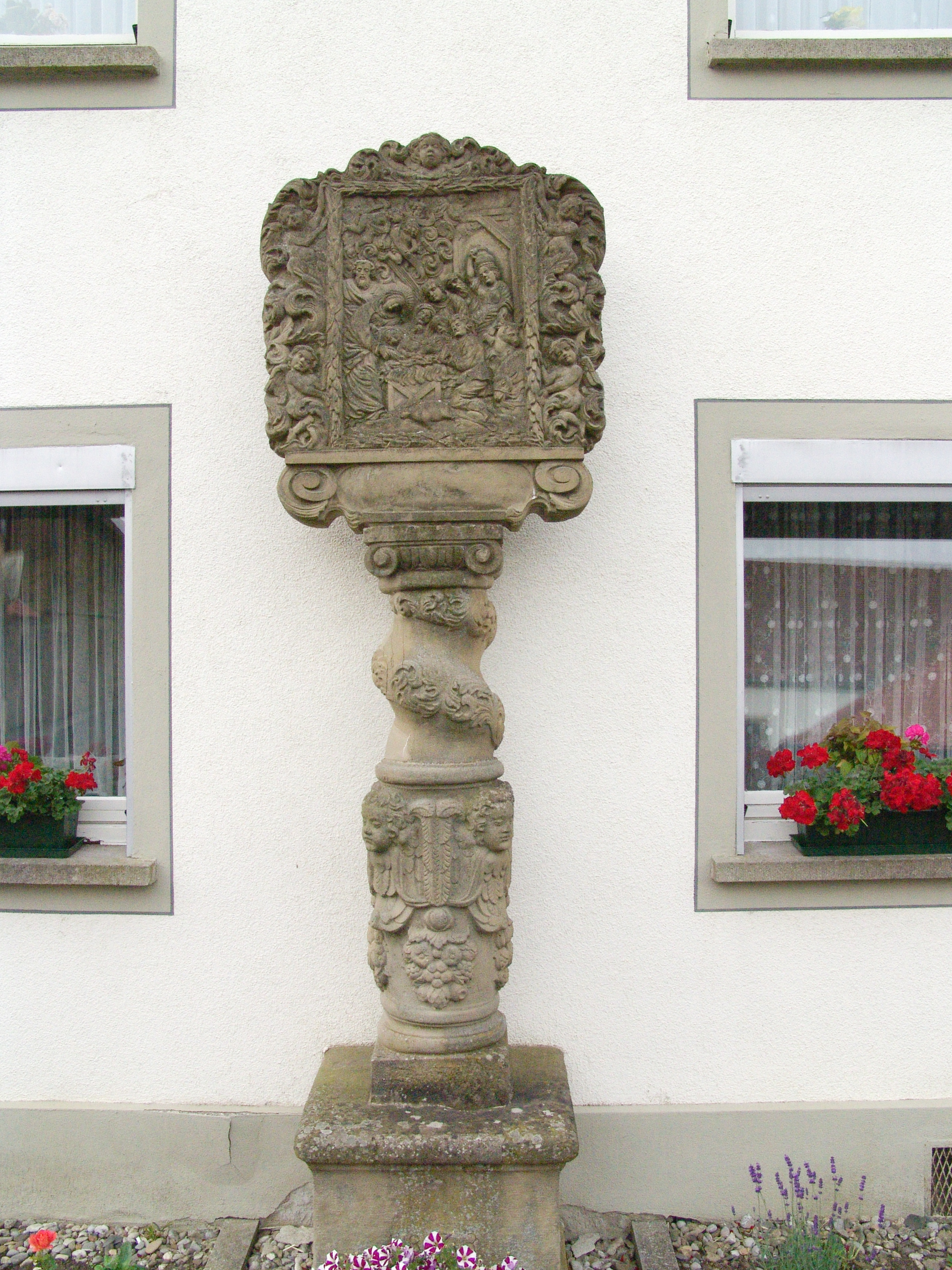 Kaltensondheim, Am Sulzfelder Weg, Bildstock